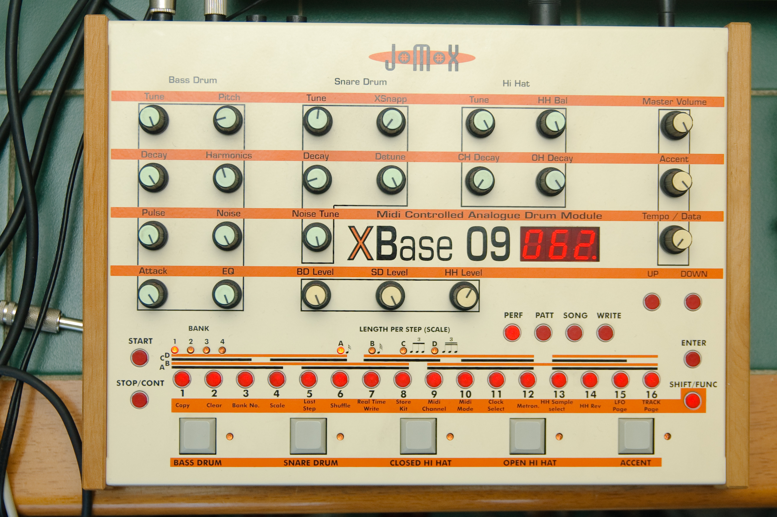 JoMoX XBase 09